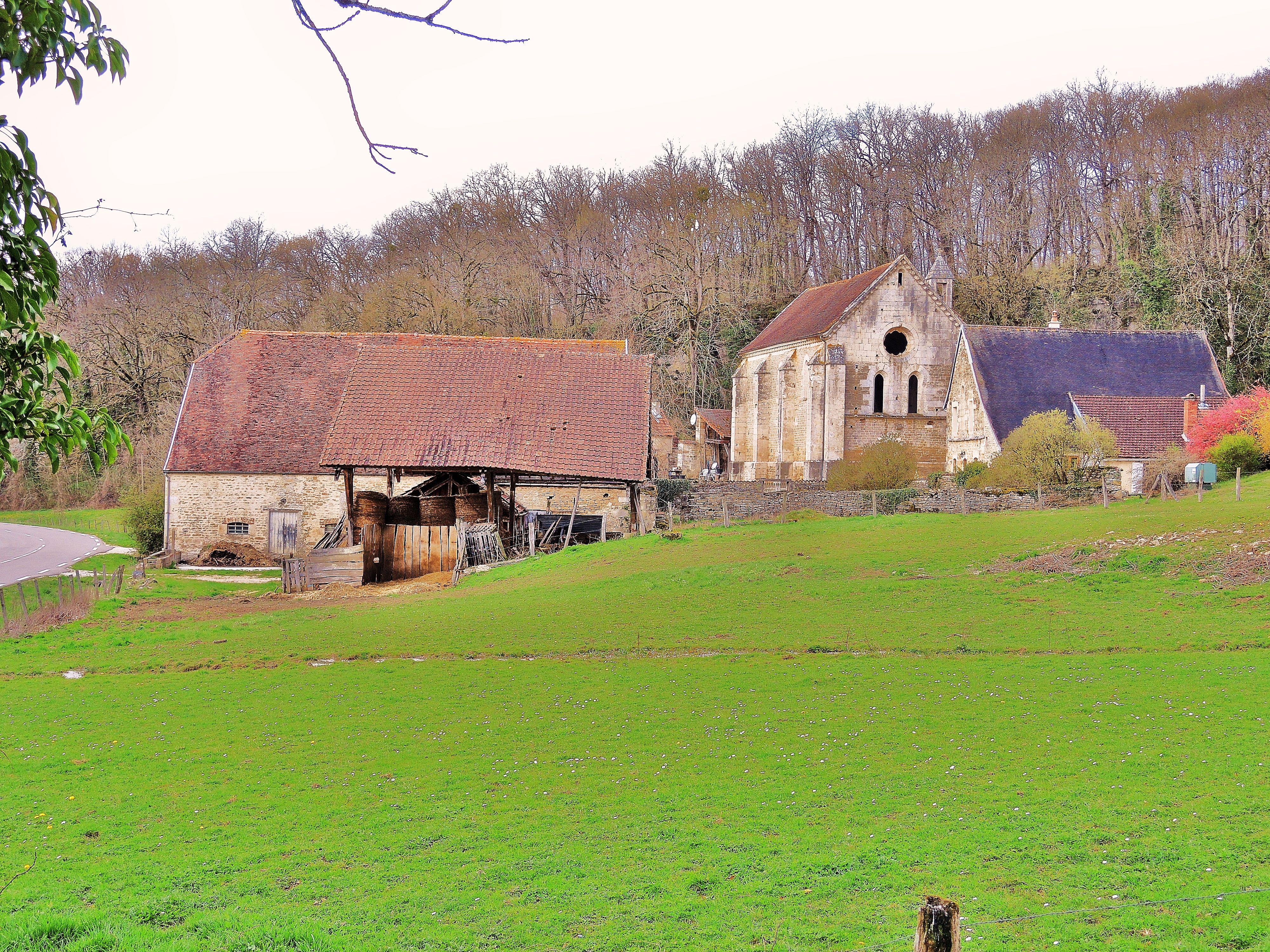 Ancienne chapelle et ferme de la Courroirie. Hameau de Lugny.